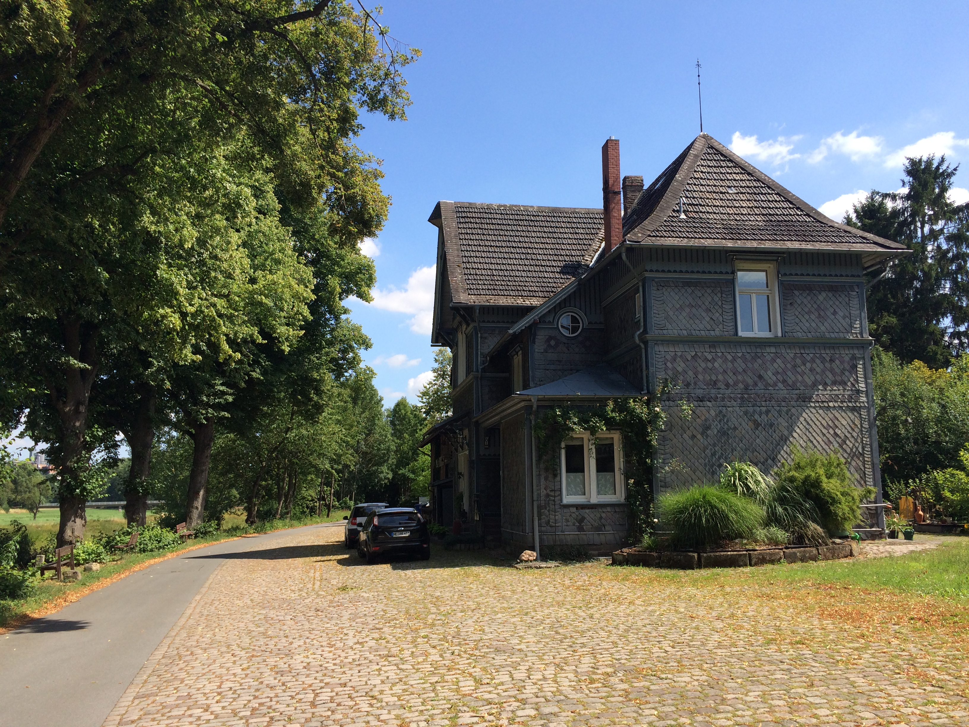 Twisteweg (Twiste-Radweg) (R 51) am ehemaligen Bahnhof Warburg Altstadt